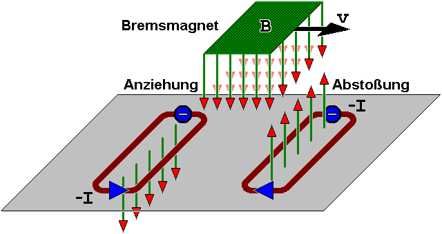 Bremswirkung der magnetischen Felder von Wirbelströmen im Fall eines sich über eine Metallplatte bewegenden Magneten